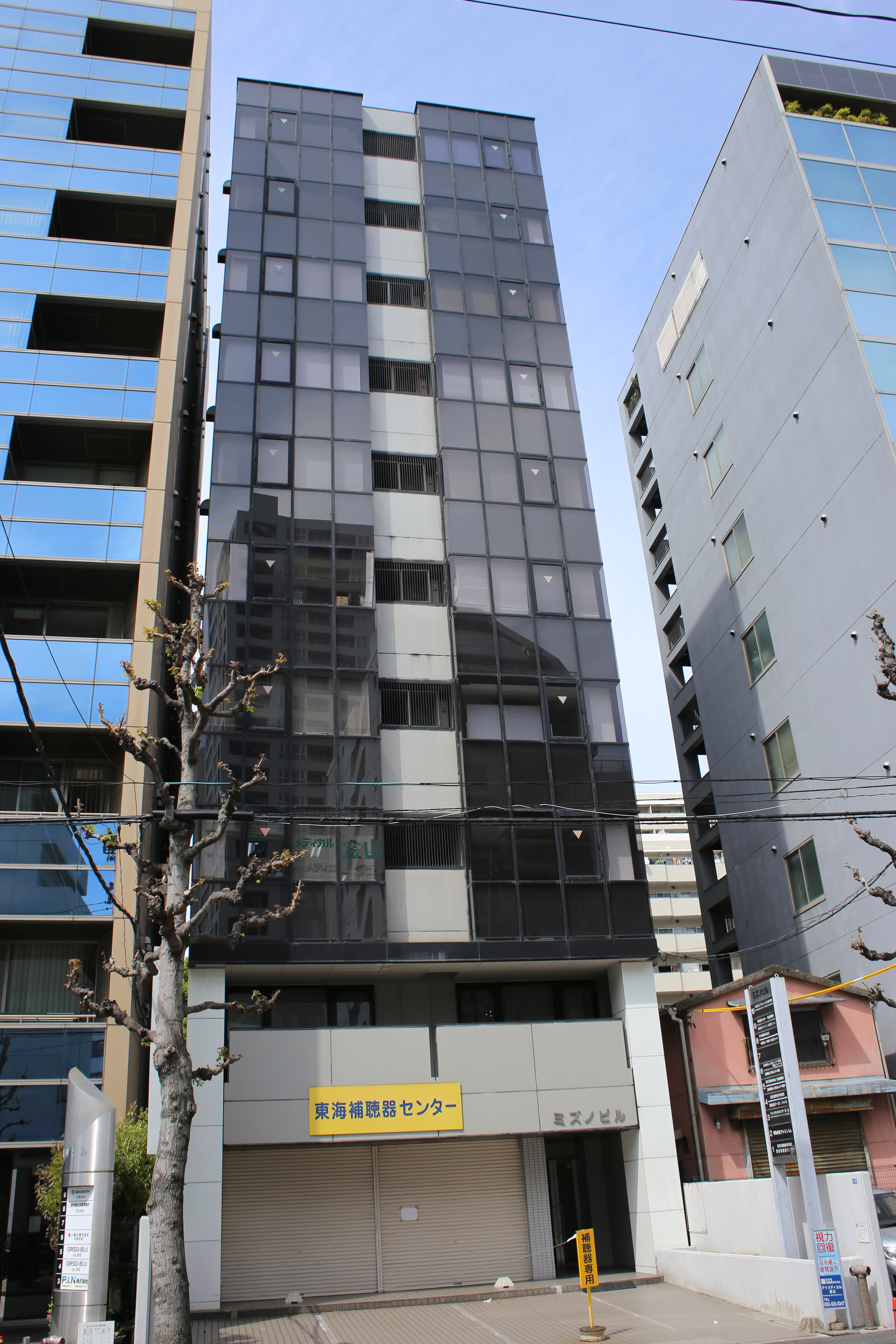 名古屋市中区金山一丁目のミズノビル